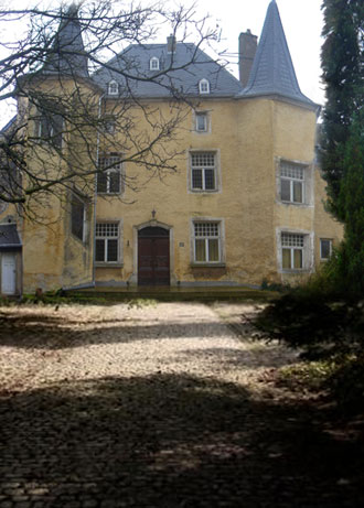 Le château de Wintrange (Luxembourg)